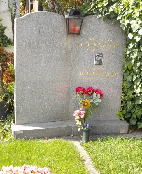 Hans Unterkircher (2-17)